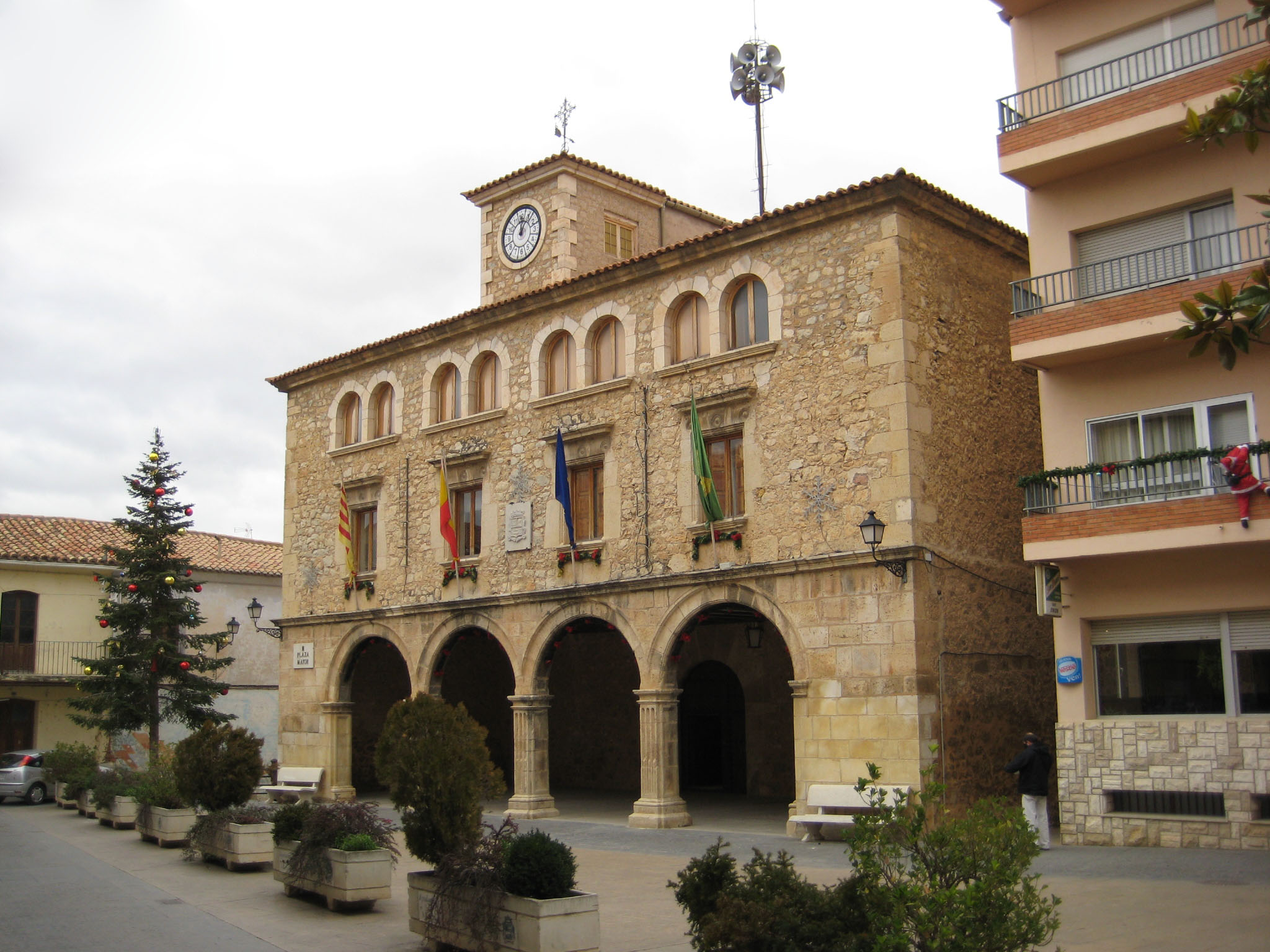 Se trata de una voluminosa casa consistorial construida a finales del s.XVI en un sobrio estilo renacentista. Consta de planta rectangular y tres alturas. Laprimera planta está construida en sillar y se abre a modo de lonja por medio de cuatro arcos de medio punto con el dovelaje moldurado que arrancan de pilares de sección cuadrada con su frente exterior acanalado. Las dos plantas superiores están construidas en mampostería con sillares de refuerzo en las esquinas y los marcos de los vanos. La planta noble presenta cuatro vanos adintelados enmarcados en su parte superior por una imposta moldurada y en la inferior por un alféizar pétreo. Finalmente, la superior presenta cuatro parejas de arcos de medio punto dovelados y unidos entre sí por un alféizar pétreo. El edificio se remata por un discreto alero de piedra sobre el que se alza en la parte central un pequeño cuerpo cúbico que actualmente acoge un reloj. El interior del edificio fue completamente transformado durante la restauración llevada a cabo en 1982.